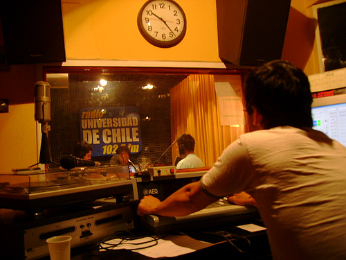 Sesión de Perdidos en el Espacio en la Radio Universidad de Chile.